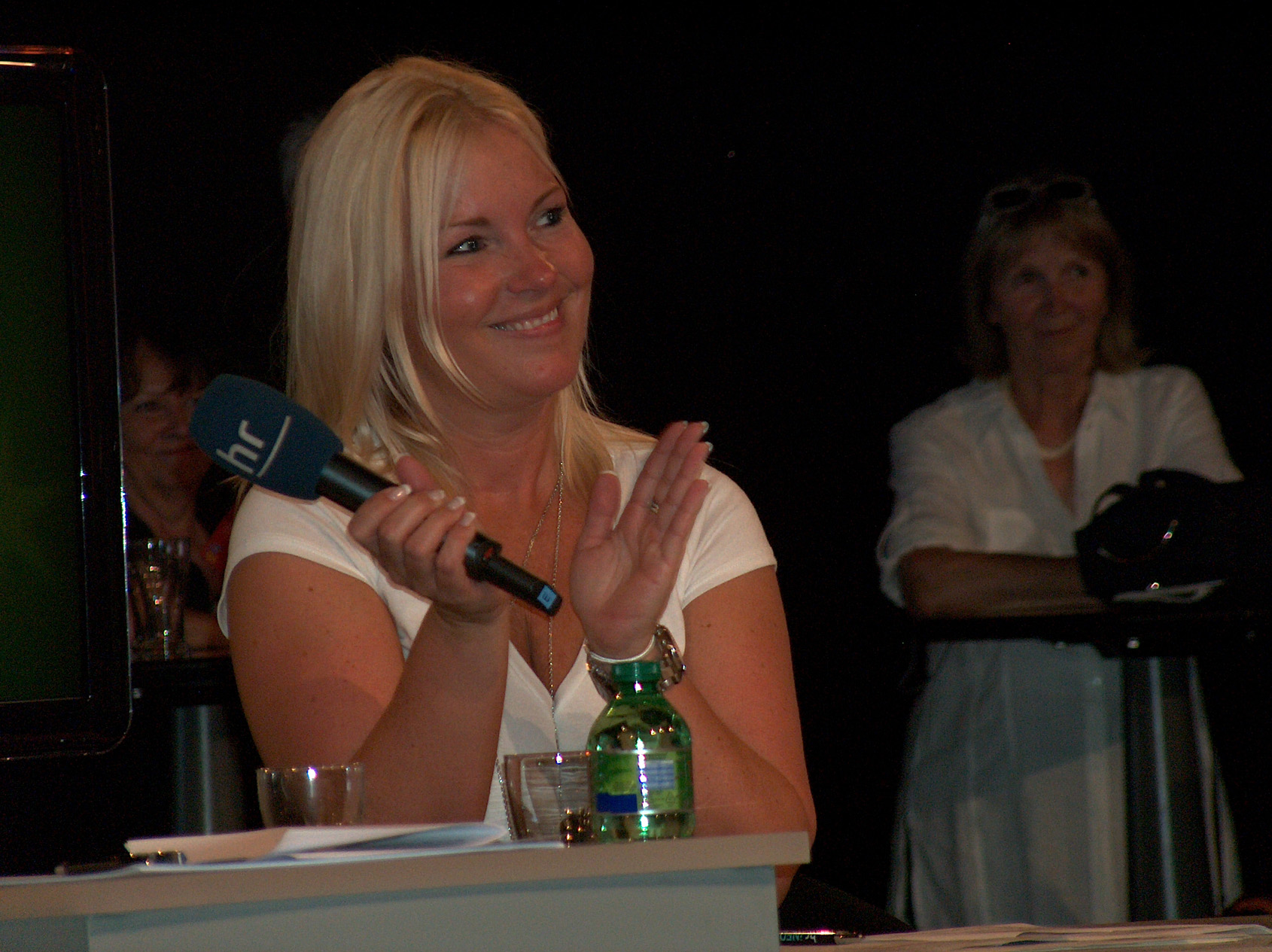 Britta Wiegand bei den Proben zum HR4-Hessenstar 2011 in Oberursel